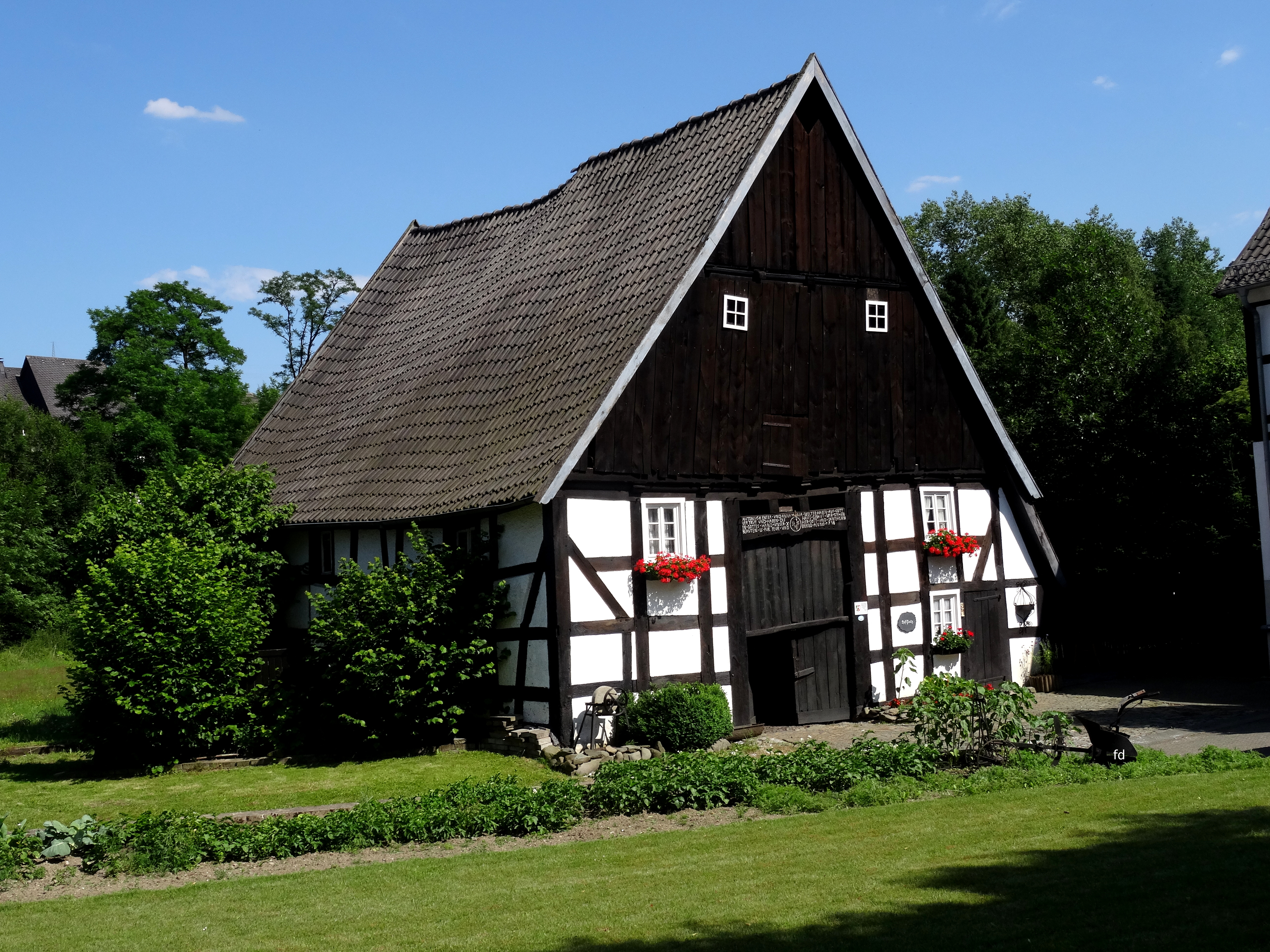 Haus Klauke-Peitz in Heringhausen This is a photograph of an architectural monument.